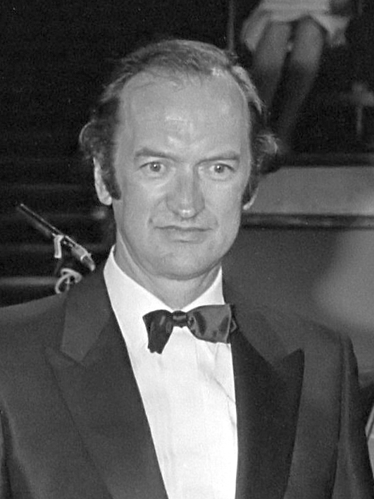 Prins Bernhard heeft in Amsterdam Erasmusprijs 1980 uitgereikt. In Concertgebouw. V.l.n.r echtgenotes van de laureaten, prins Bernhard, de laureaat Nicolaus Hamencourt en laureaat Gustav Leonhardt 8 september 1980